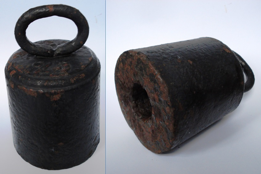 Gewicht 25 Pfund